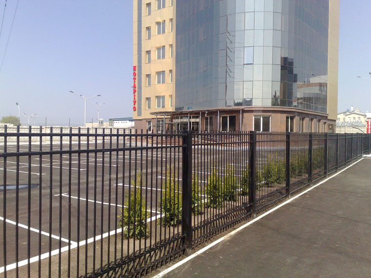 Фото території поблизу БЦ Golden Center